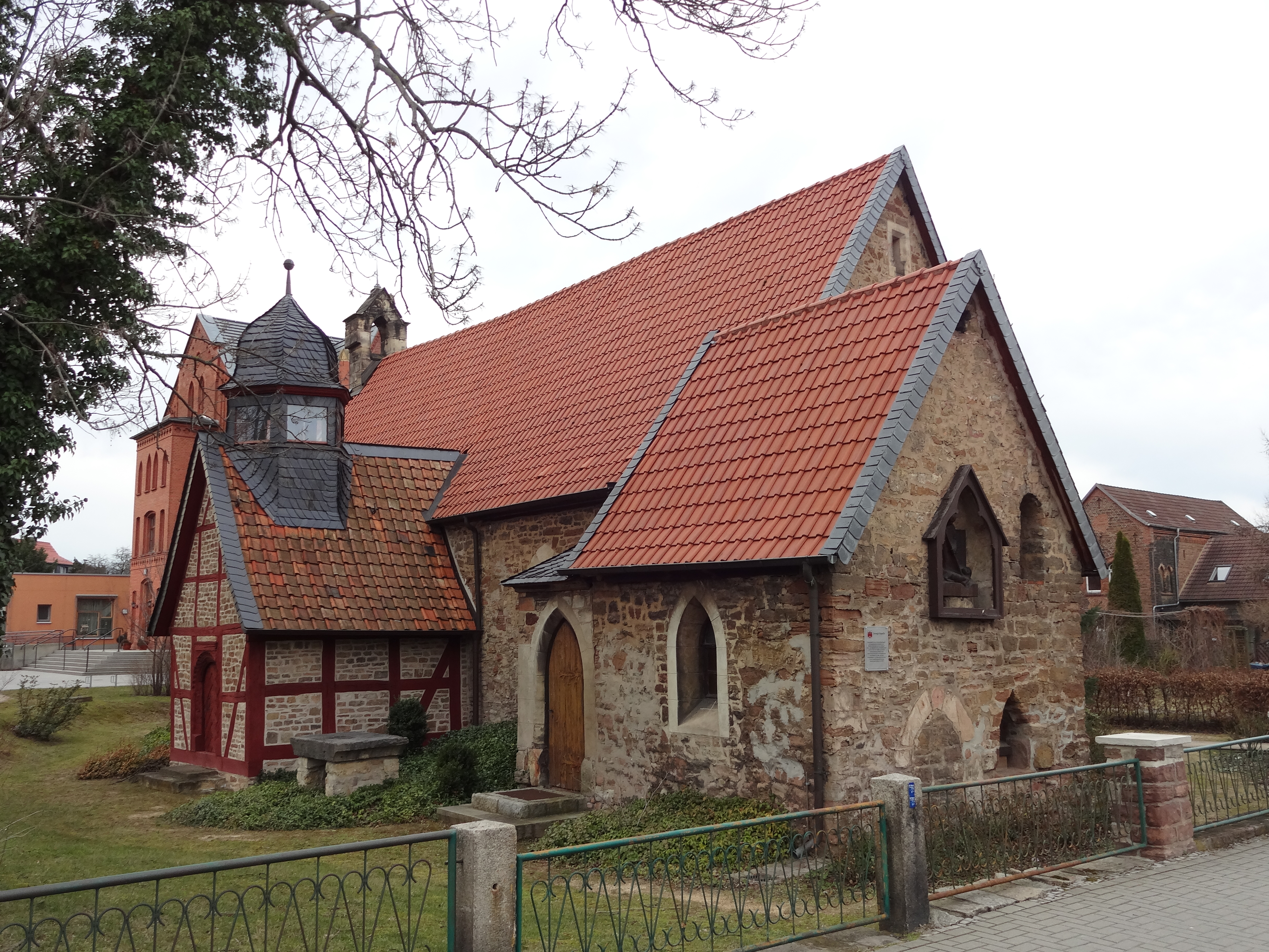 denkmalgeschützte Georgii-Kapelle an den Ilsenburger Straße in Wernigerode